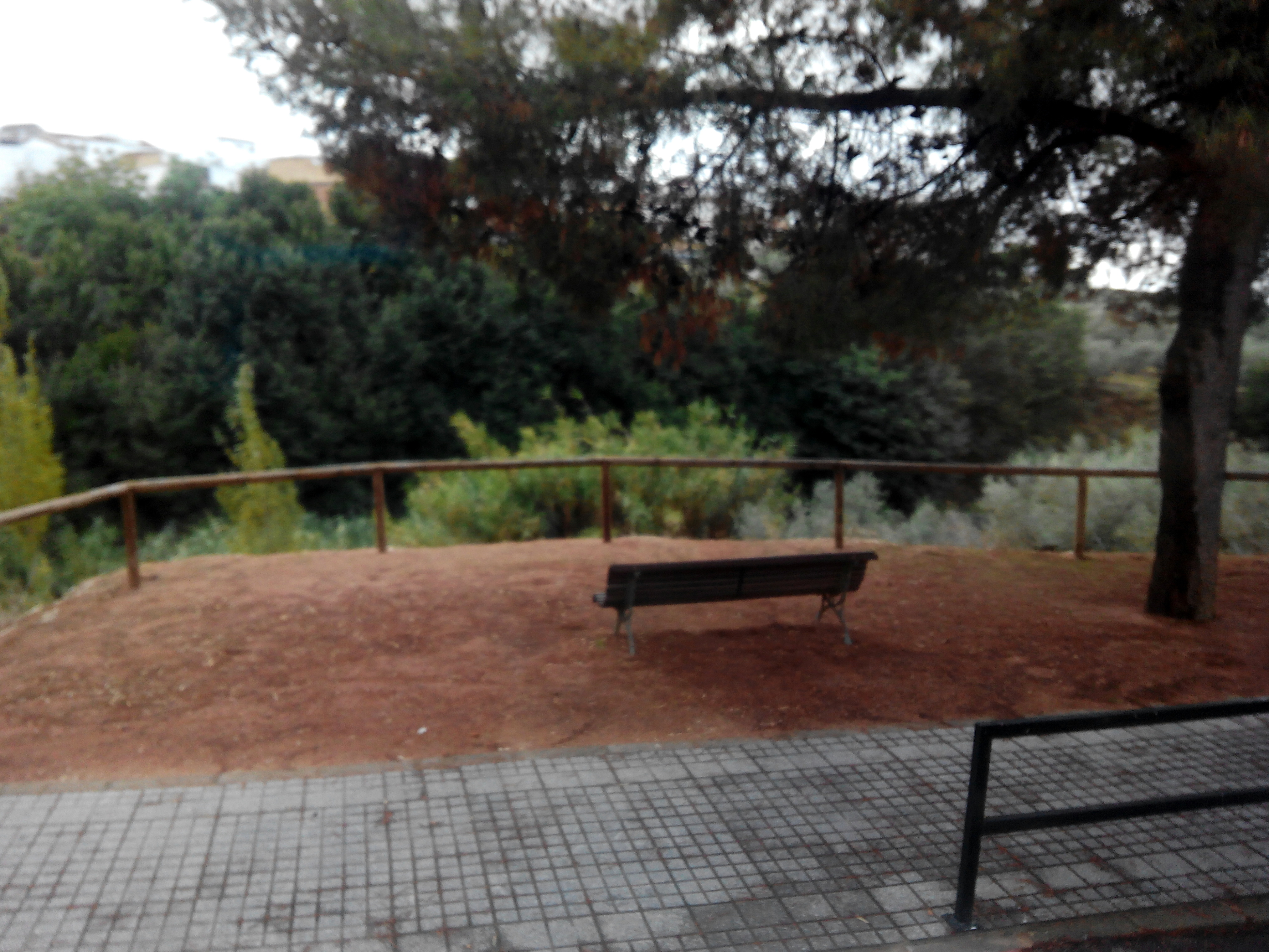 Mirador de la Alameda, Montalbán de Córdoba (España).